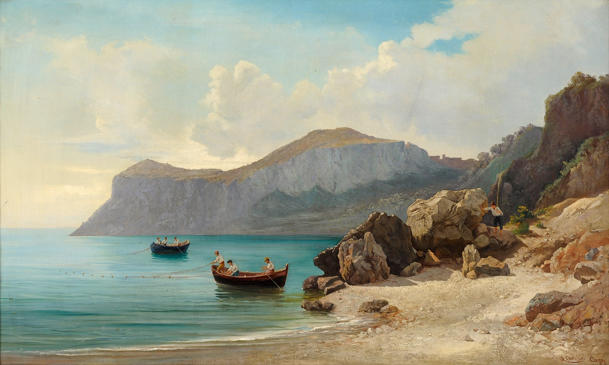 Fischer auf Capri. Signiert. Bezeichnet: Capri. Öl auf Leinwand, 60 x 100 cm